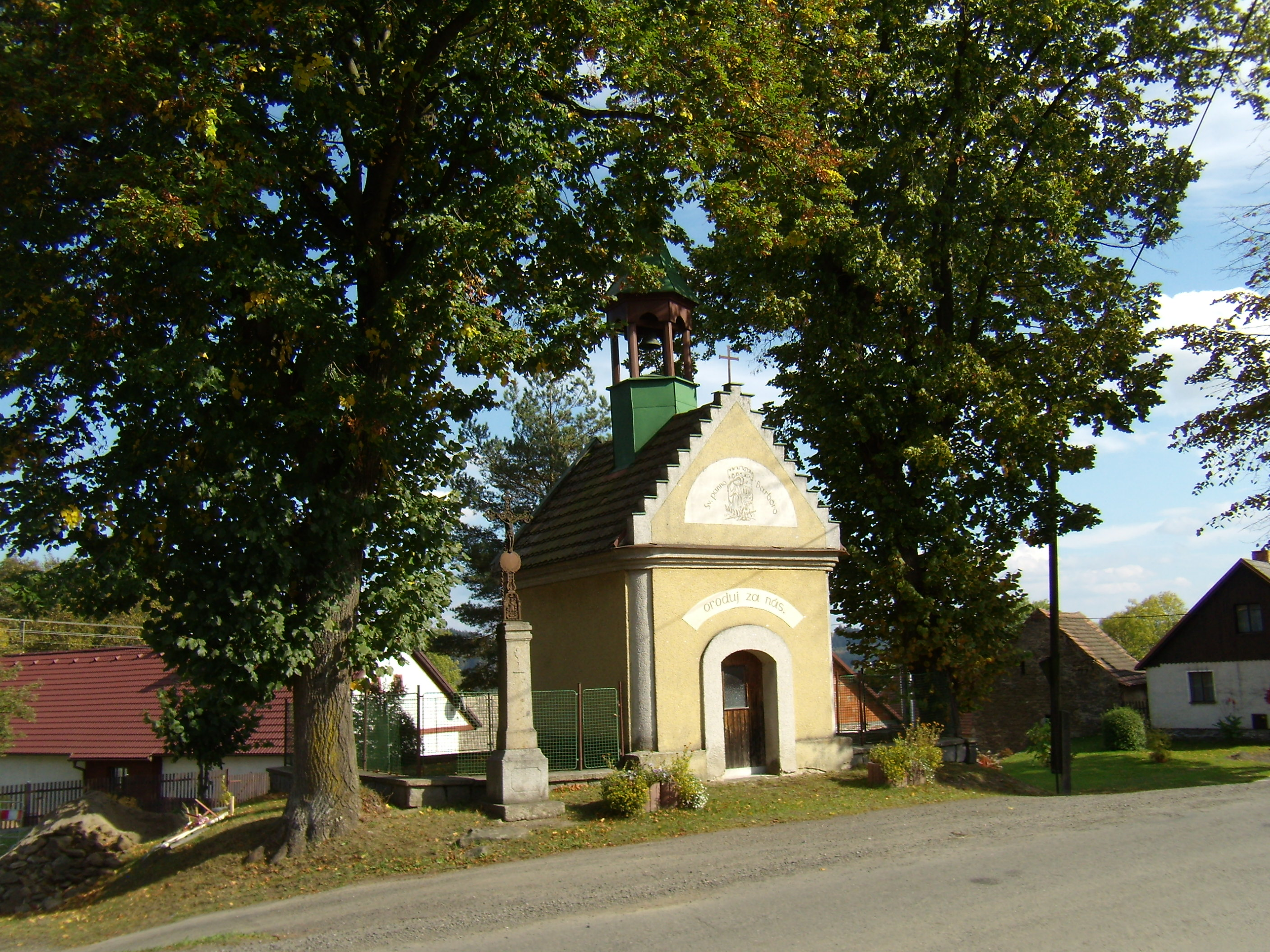 Kvasetice - kaple svaté Barbory